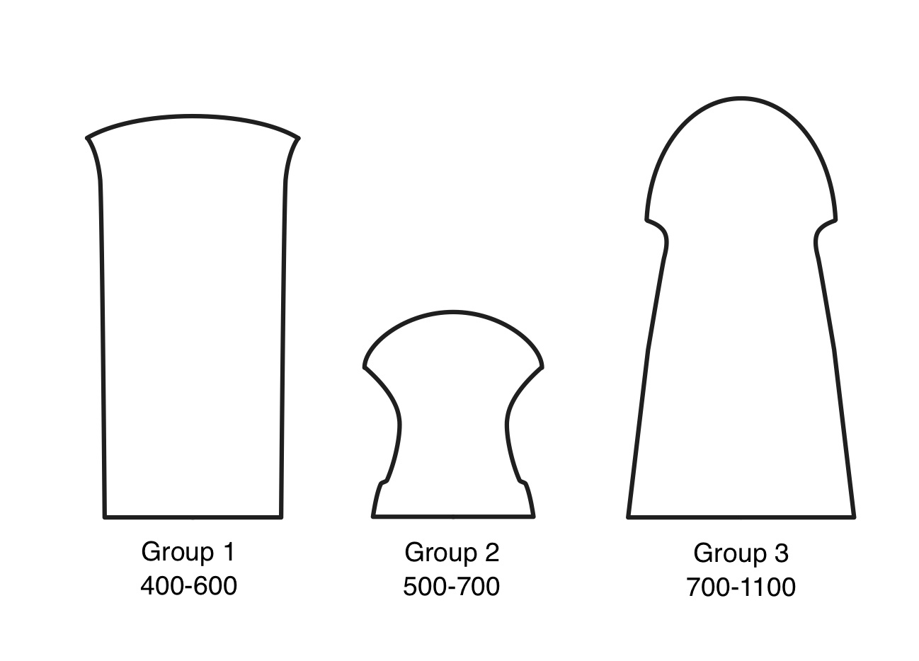 絵画石碑の年代別、形状別分類